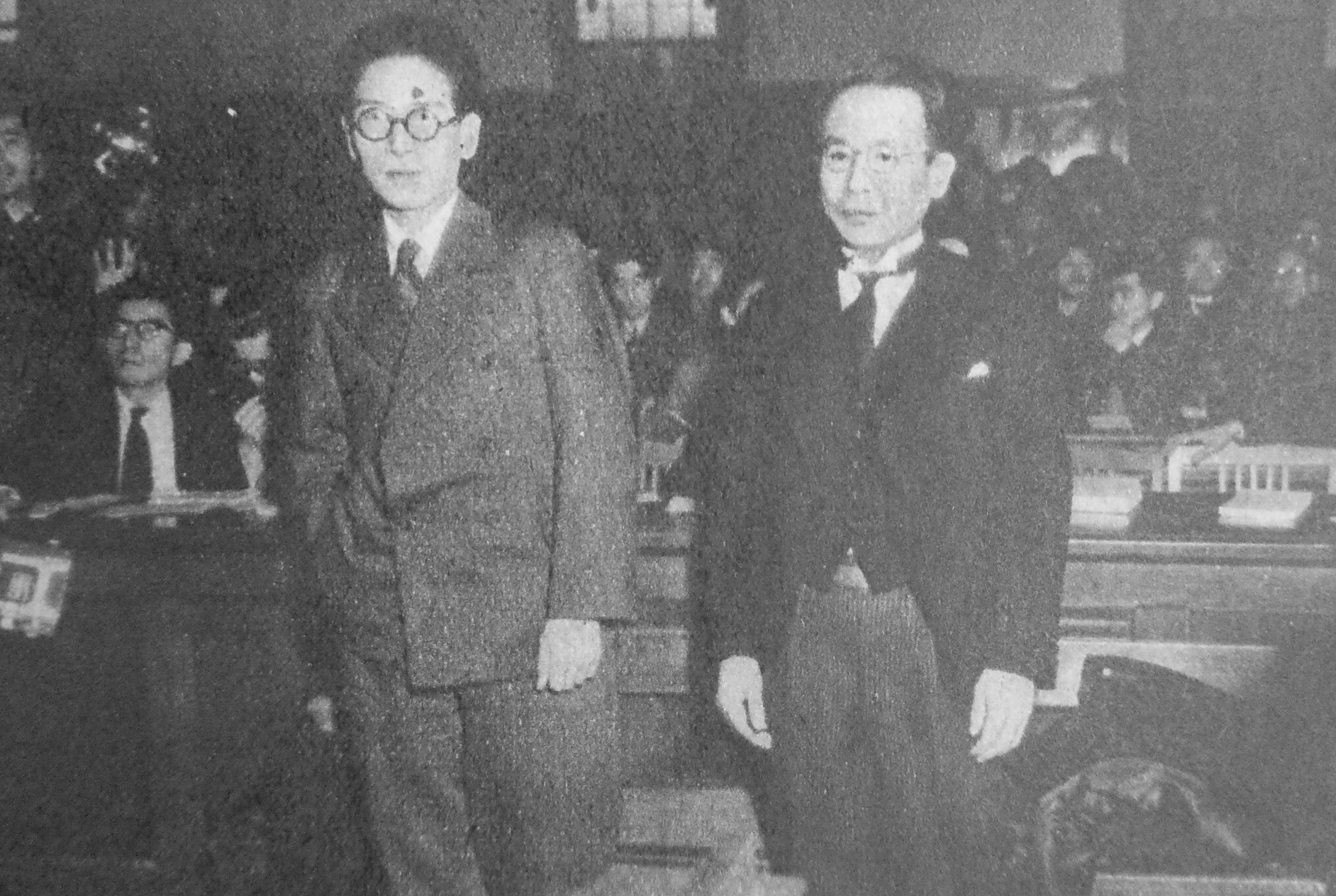 チャタレー裁判一審判決日の伊藤整（左）と小山久二郎（右）